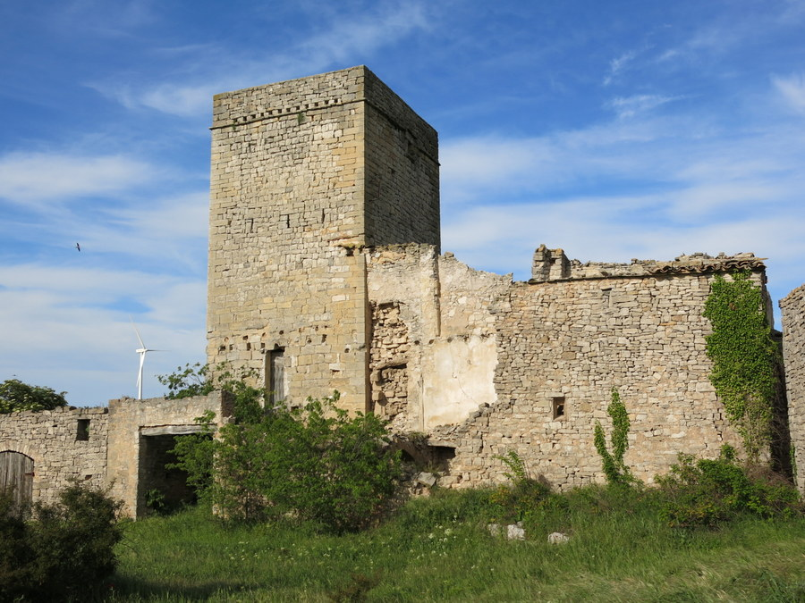 castell de La Sala de Comalats, comarca de Conca de Barberà, Catalunya